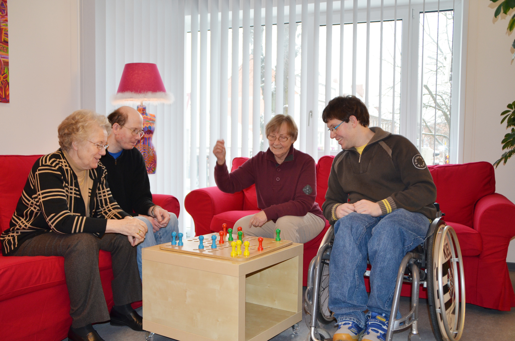 Wohnen in Gemeinschaft